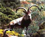 Cabras Monteses